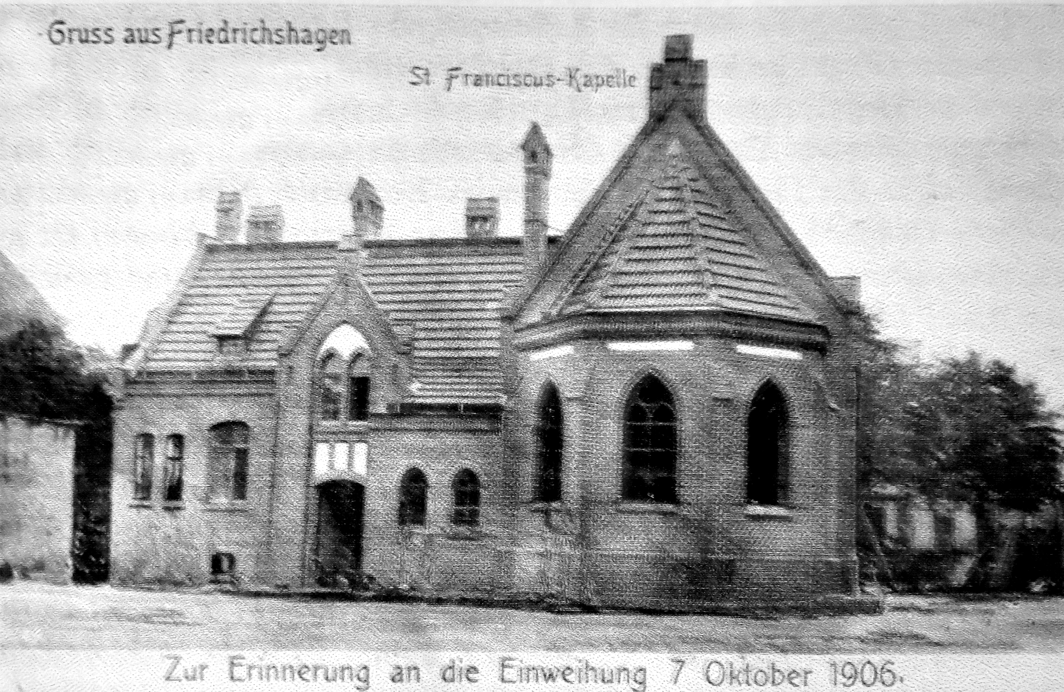 Franziskus-Kapelle in Berlin-Friedrichshagen